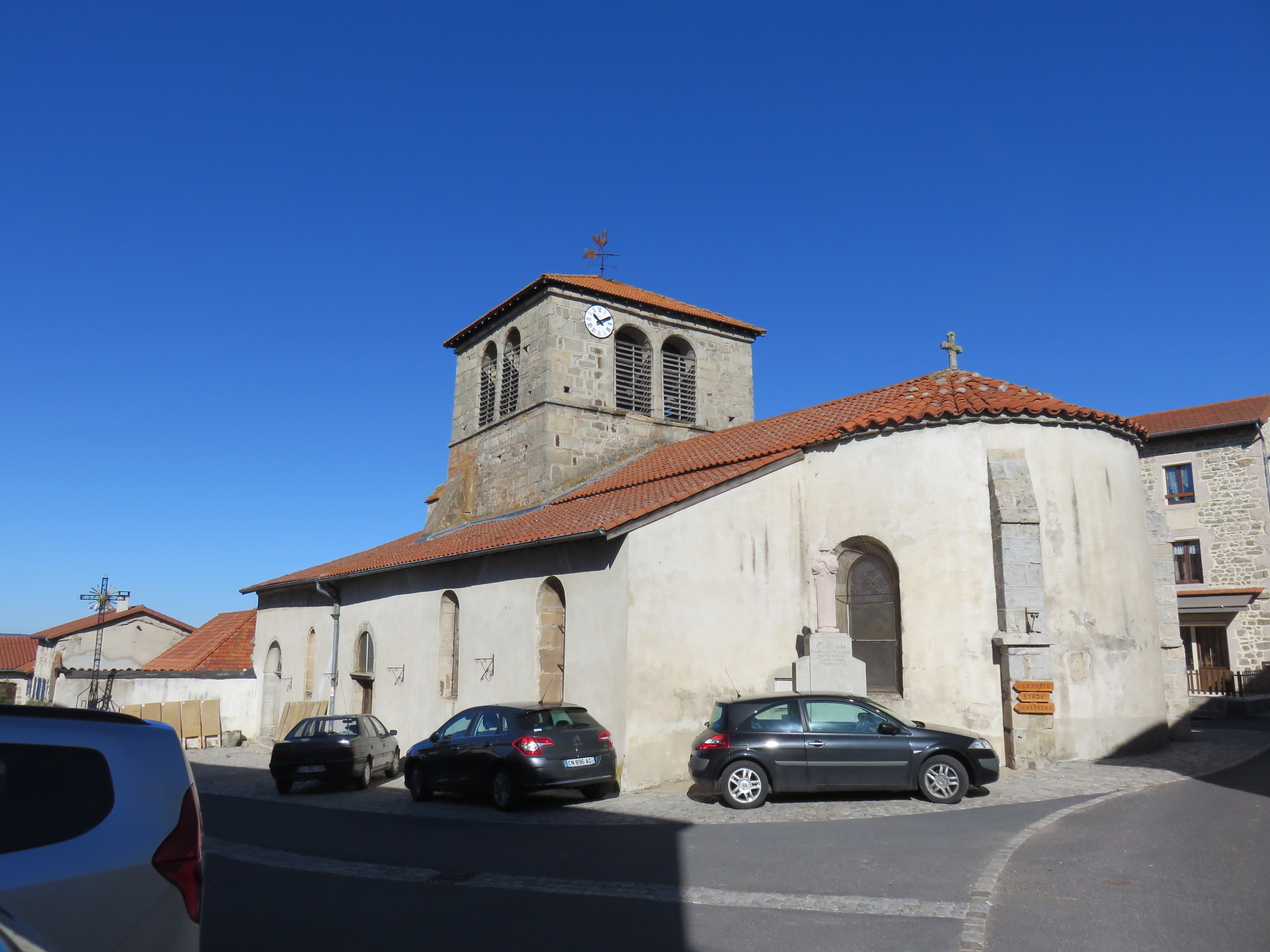 Église Saint-Pierre de Saint-Pierre-du-Champ, dans la Haute-Loire.